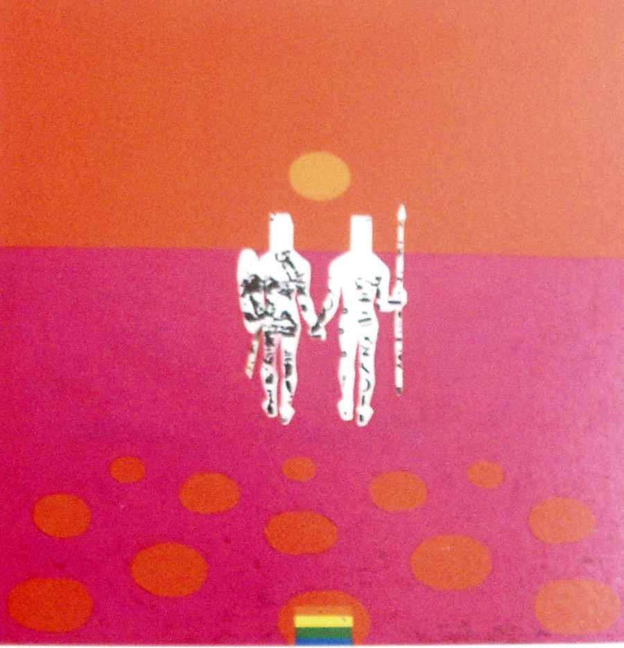 Gilgamesz i Enkidu, zdjęcie z ilustracji Marka Zuławskiego z folderu wystawy publicznej Archiwum Emigracyjnego Uniwersytetu UMK w Toruniu